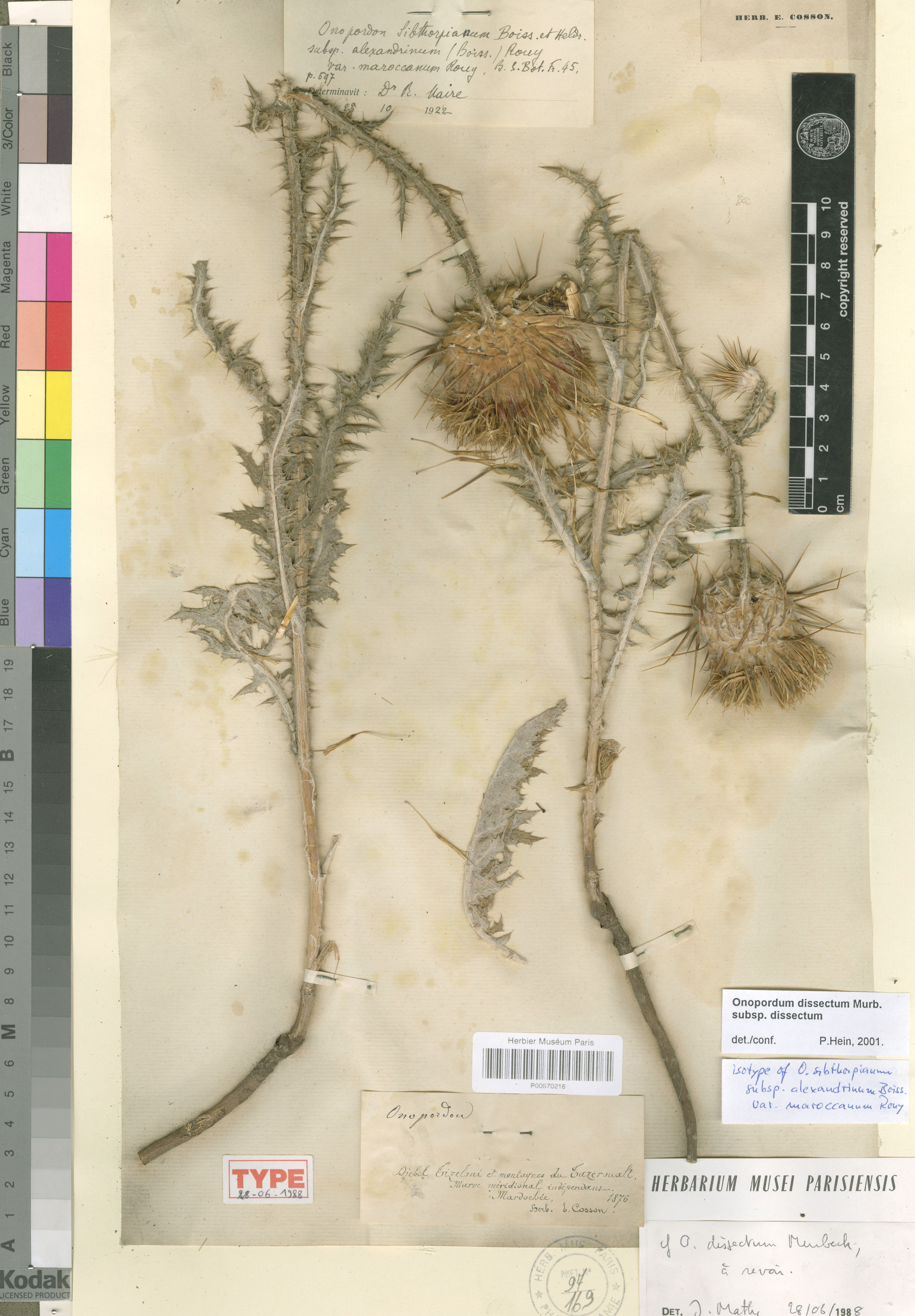 Onopordum dissectum - Tipo del herbario de E. Cosson, 1876 - Jebel Tizelmi y montañas de Tazeroualt, Marruecos.